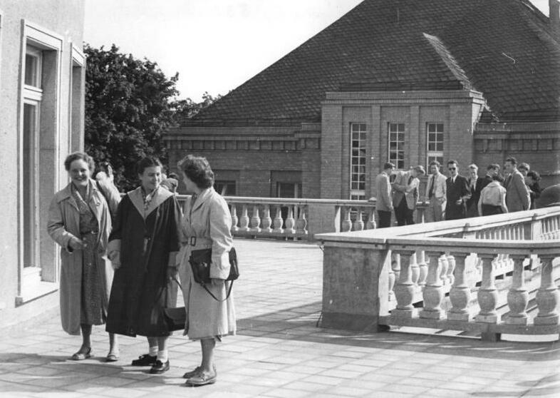 Zentralbild-Biscan 5 Motive 7.9.1955 Neubau der Medizinischen Akademie in Magdeburg in Betrieb genommen Der erste Neubau der Medizinischen Akademie in Magdeburg wurde am 5. September 1955, am Tage des Beginns eines neuen Studienjahres in Betrieb genommen. Das Haus, für dessen Bau die Regierung der Deutschen Demokratischen Republik 1,2 Millionen DM bereitstellte, enthält einen mit allen technischen Mitteln ausgestatteten Hörsaal für 250 Studenten, eine Bibliothek, Studierzimmer und Aufenthaltsräume. Weitere Neubauten sind bereits im Entstehen. UBz: Studenten auf der Terrasse des neuen Gebäudes während einer Vorlesungspause.